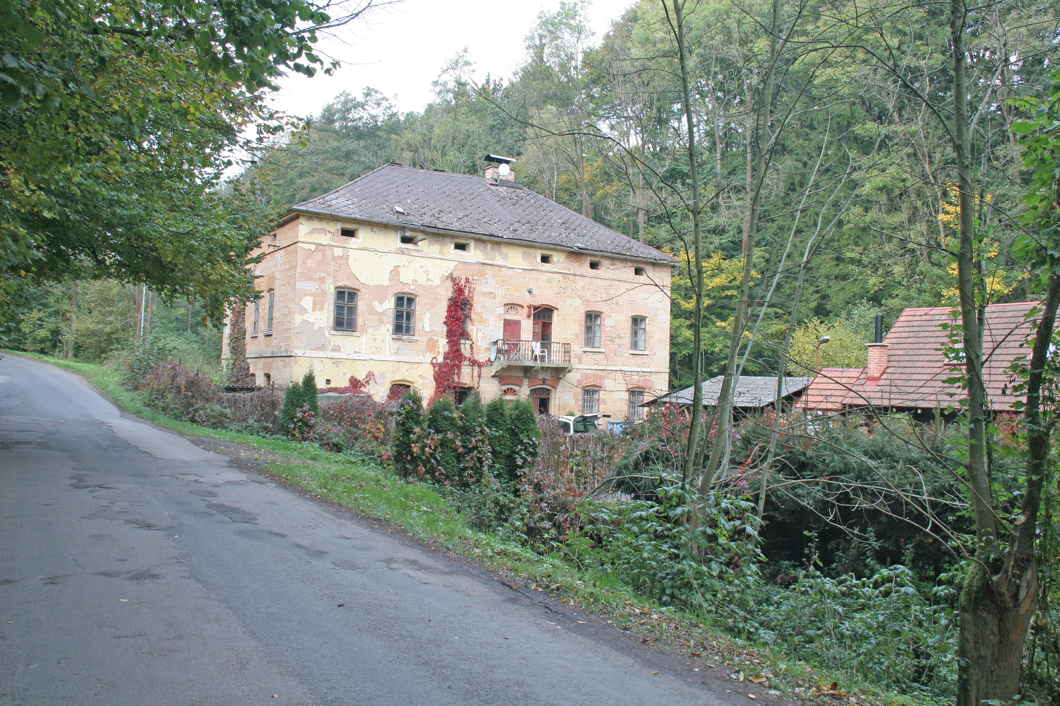 Svatogothardská Lhota čp. 1